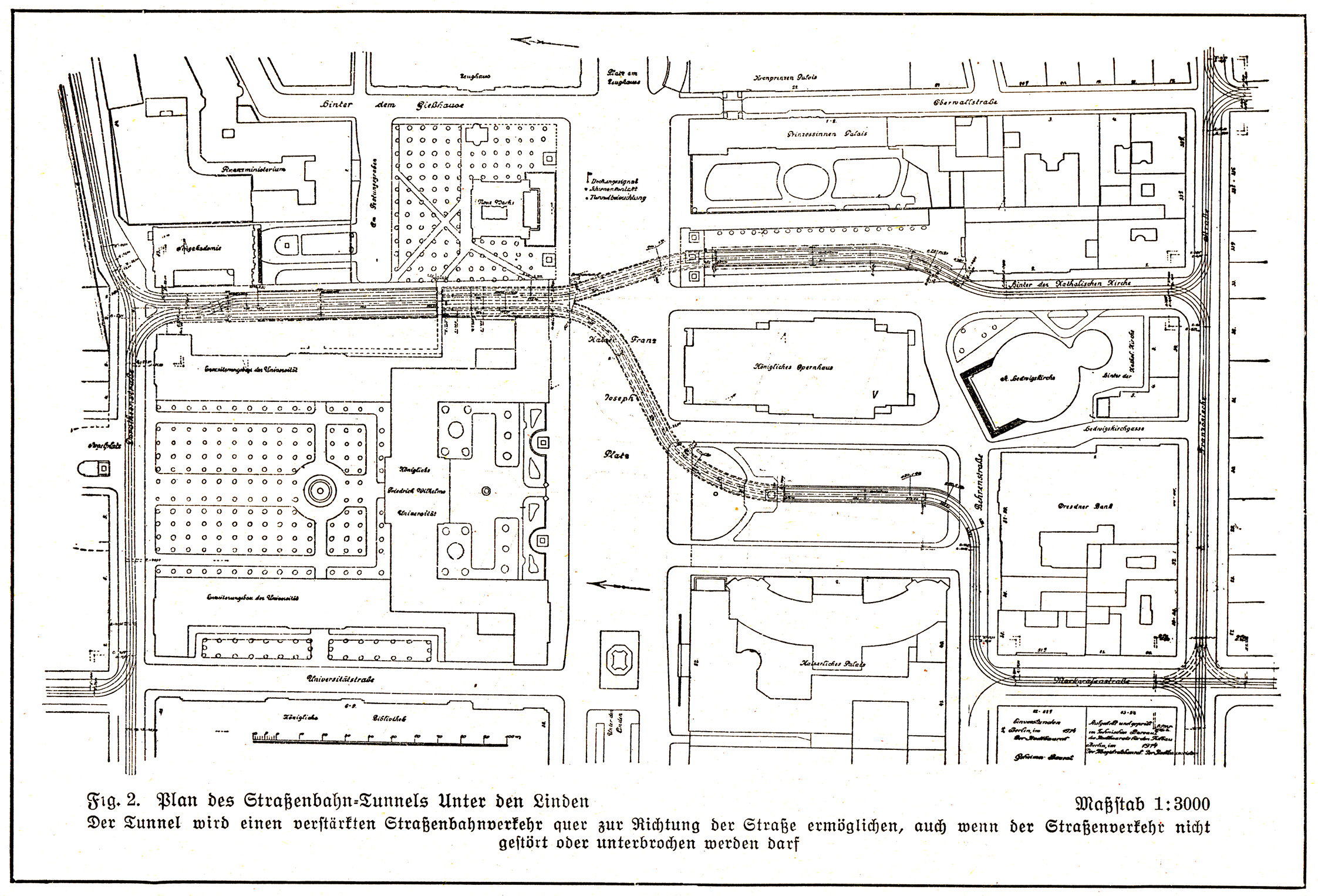 Berlin - Plan des Lindentunnels 1:3000